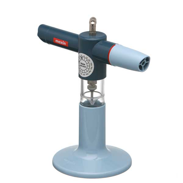 Maxin nebulisator tillför läkemedel utan knapptryckning.